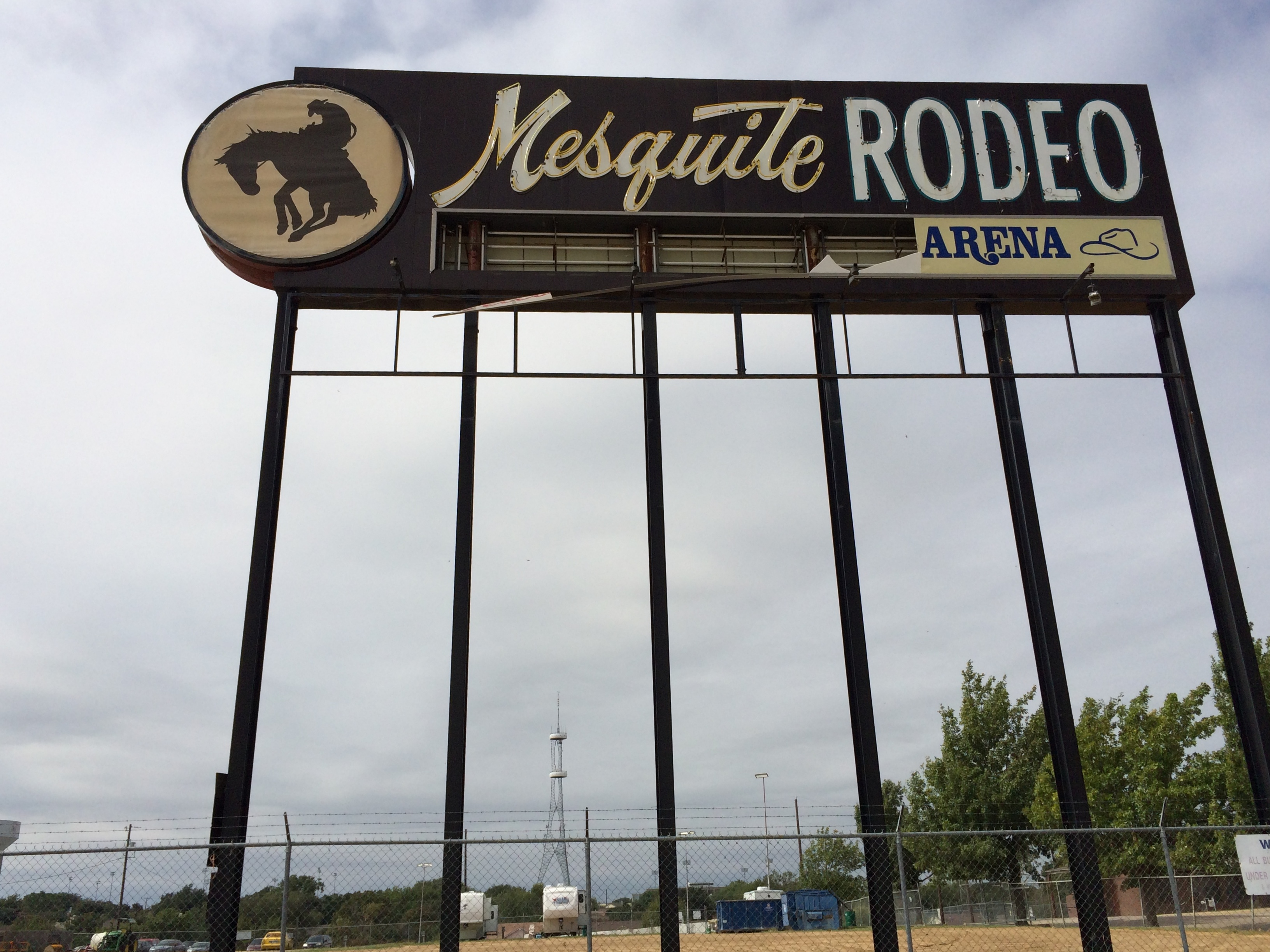 Mesquite Rodeo sign